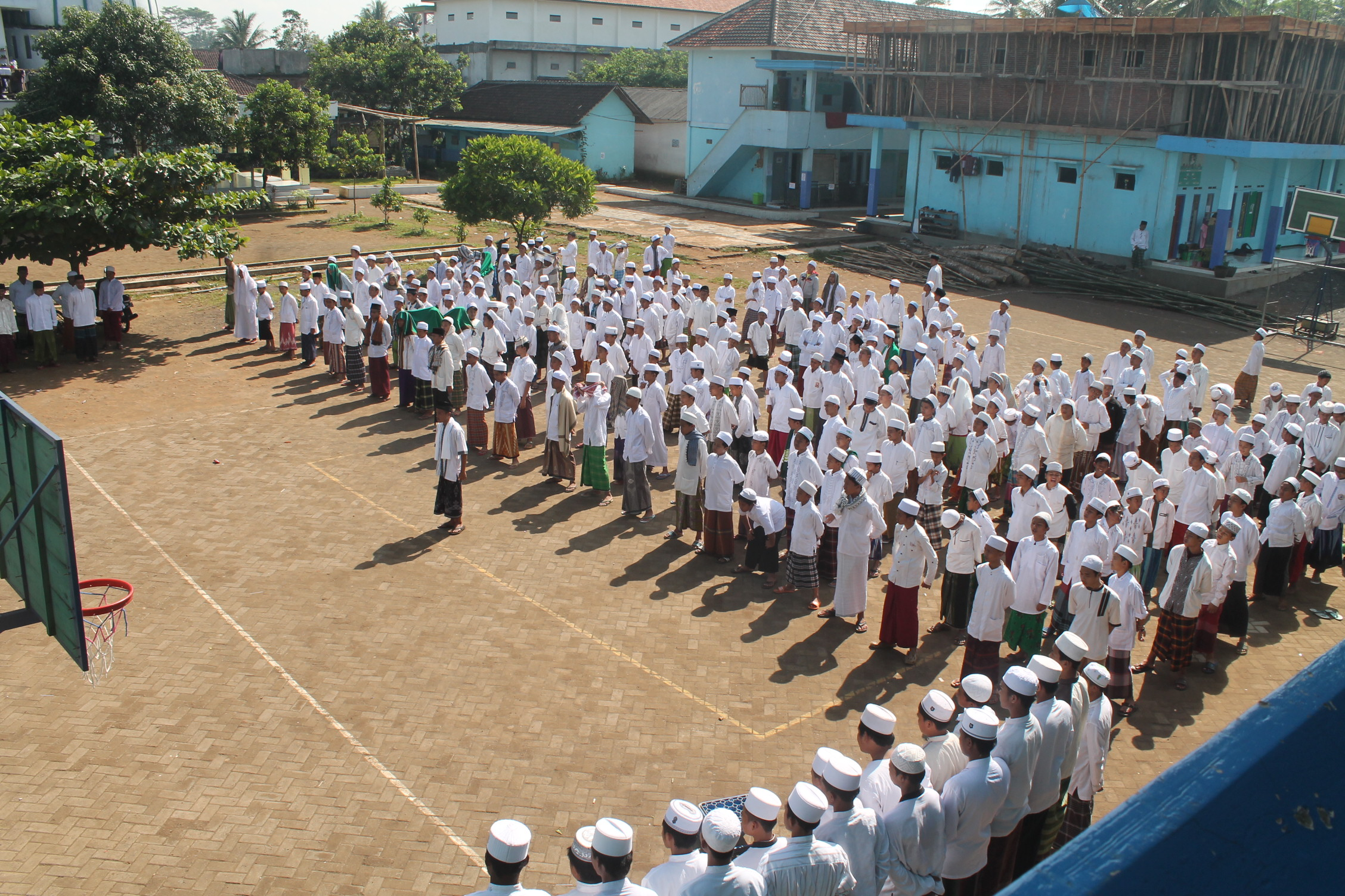 Santri Pondok Pesantren Al-Khoirot sedang melaksanakan apel hari santri pertama pada 22 Oktober 2016